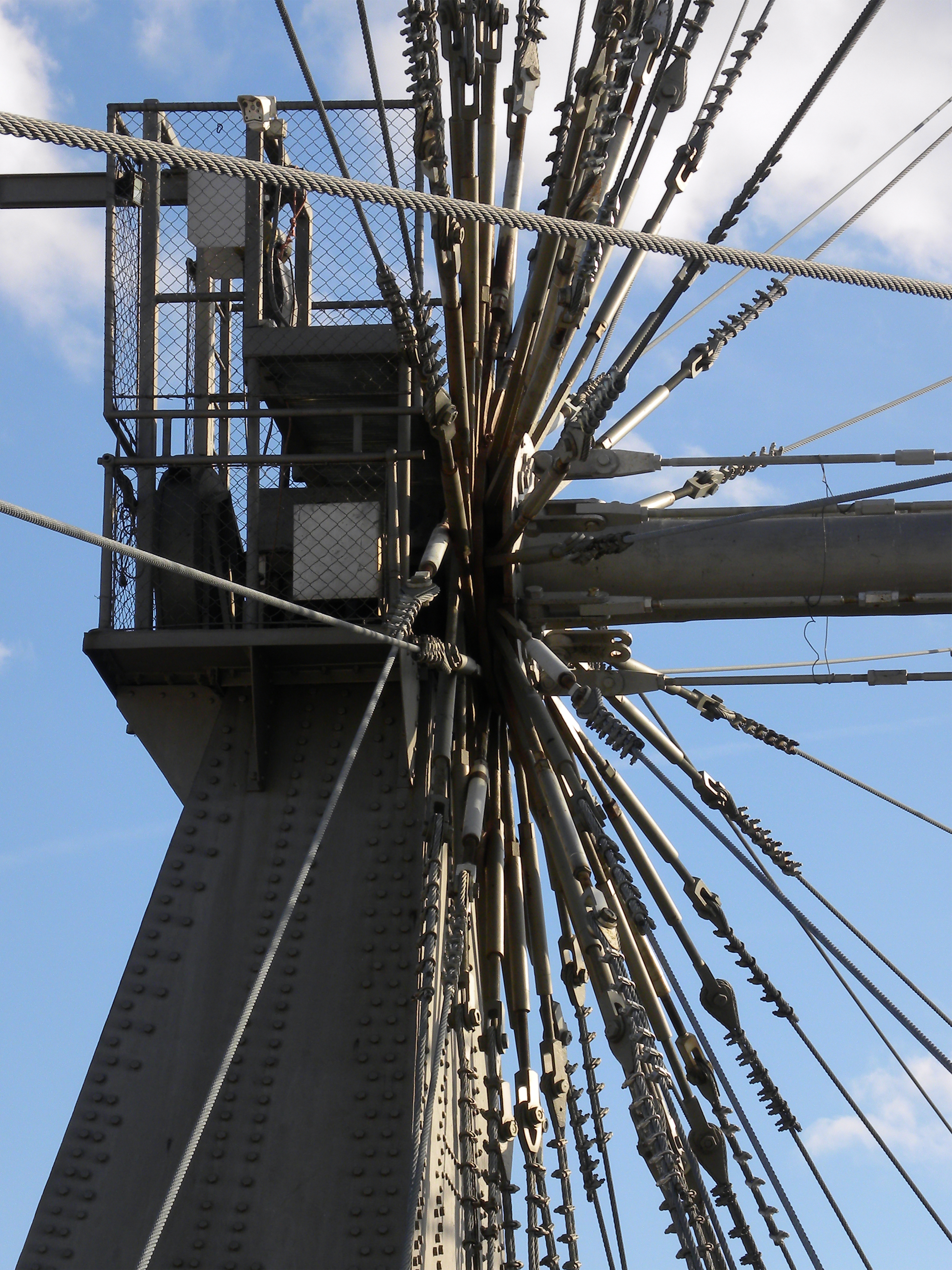 Befestigung der Stahlseile des Riesenrades